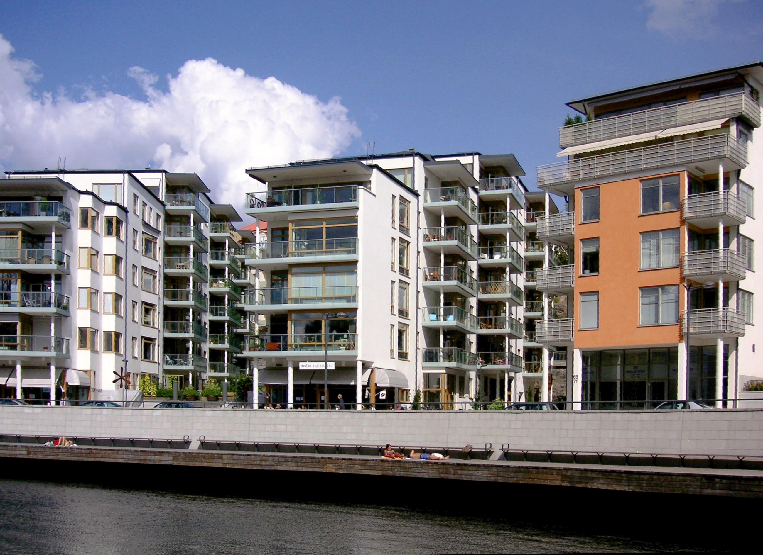 Nybyggen på Lilla Essingen